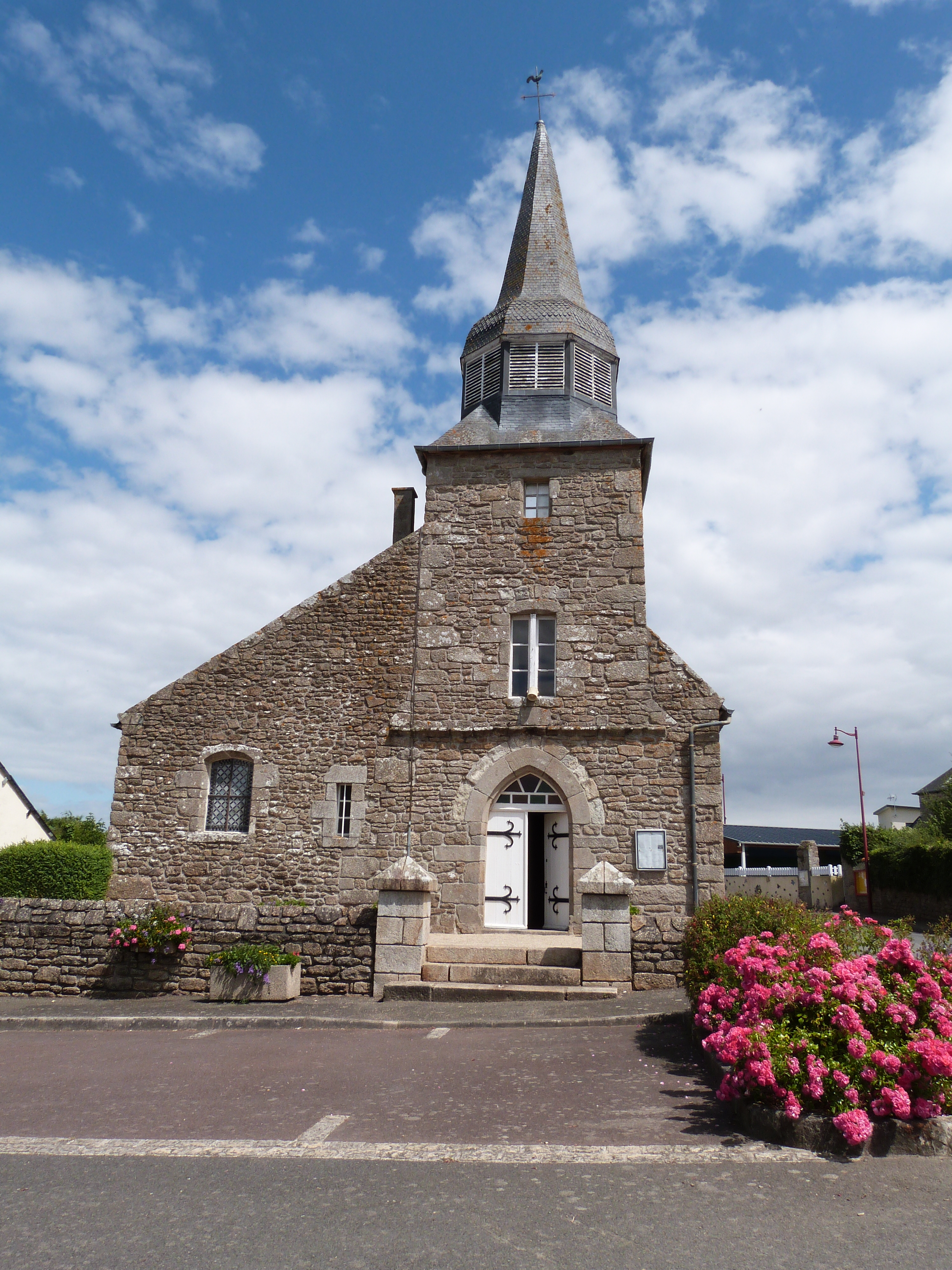 L'église Notre-Dame de Saint-Trimoël